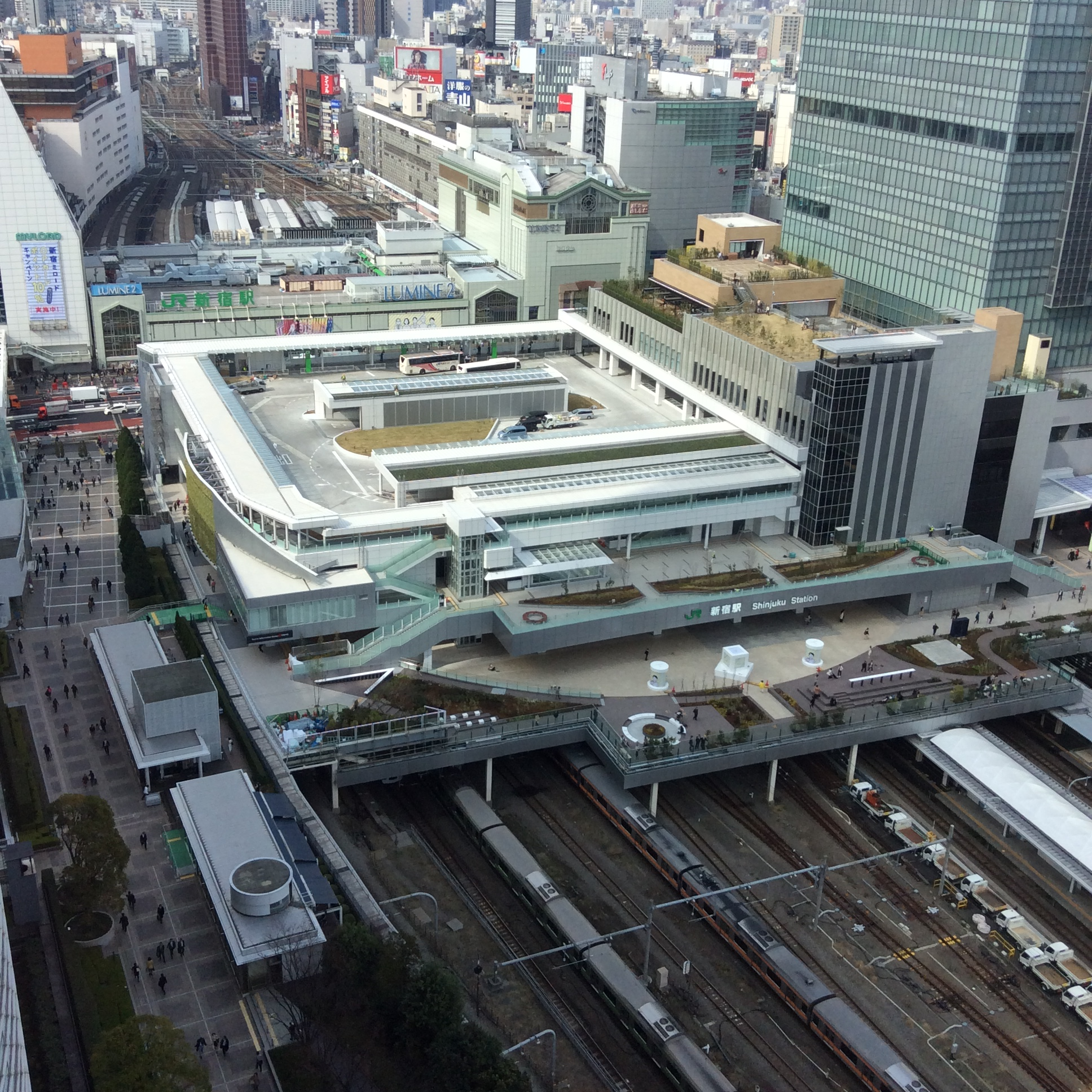 JR 新宿ミライナタワー